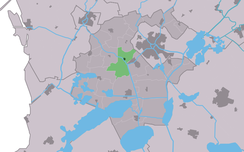 Kaartsje fan himrik fan Easthim